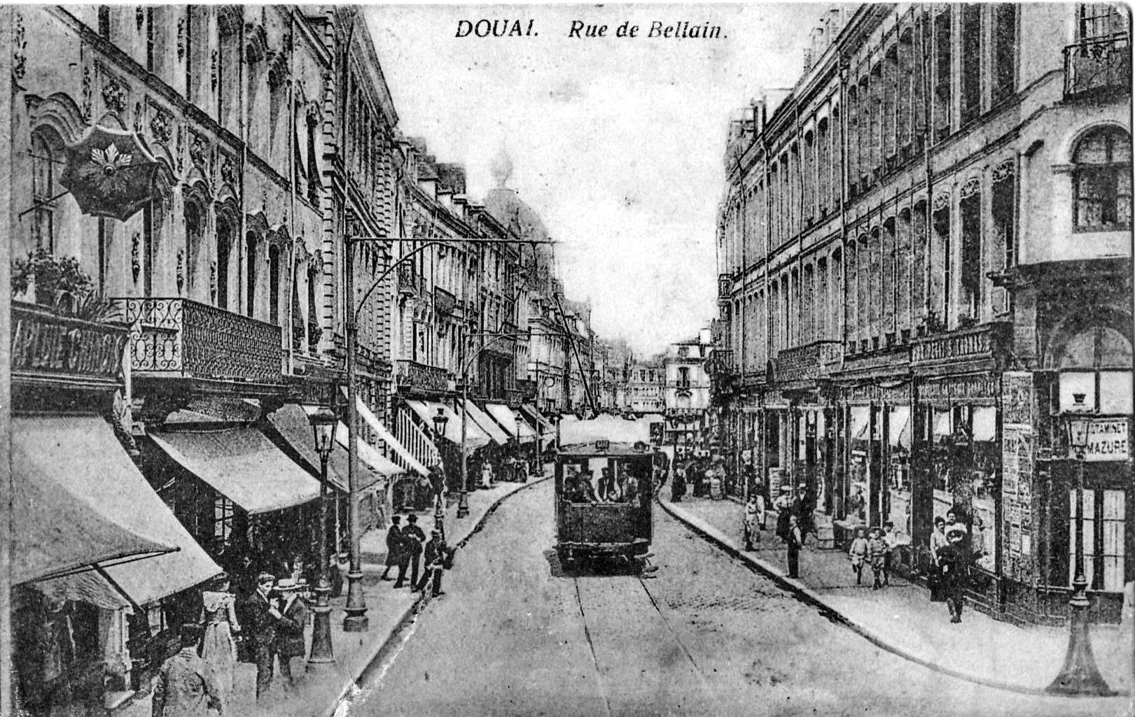 Carte postale ancienne sans mention d'éditeur DOUAI - La rue de Bellain